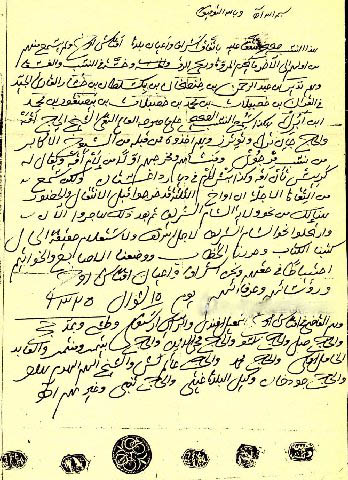 Чеченский тептар - исторические и родовые записи